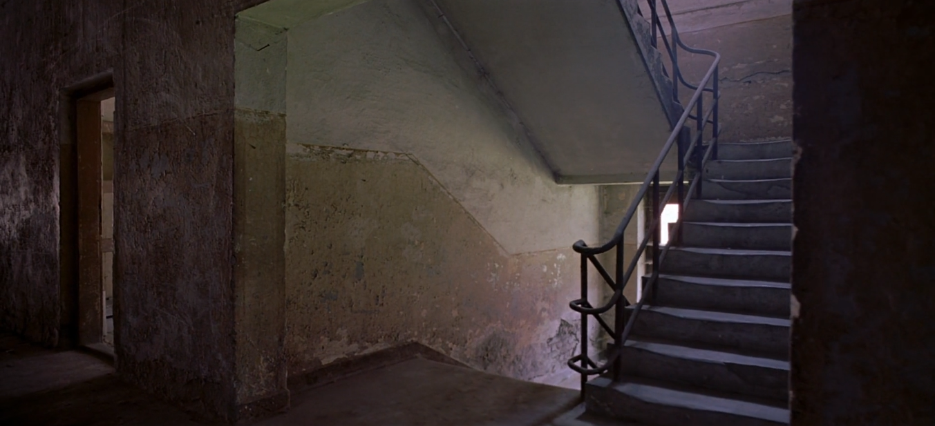 ഓഷ്വിറ്റ്സ് കോൺസെൻട്രേഷൻ ക്യാമ്പ്